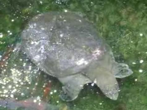 Rafetus swinhoei